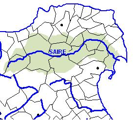 Parcours schématique de la Saire